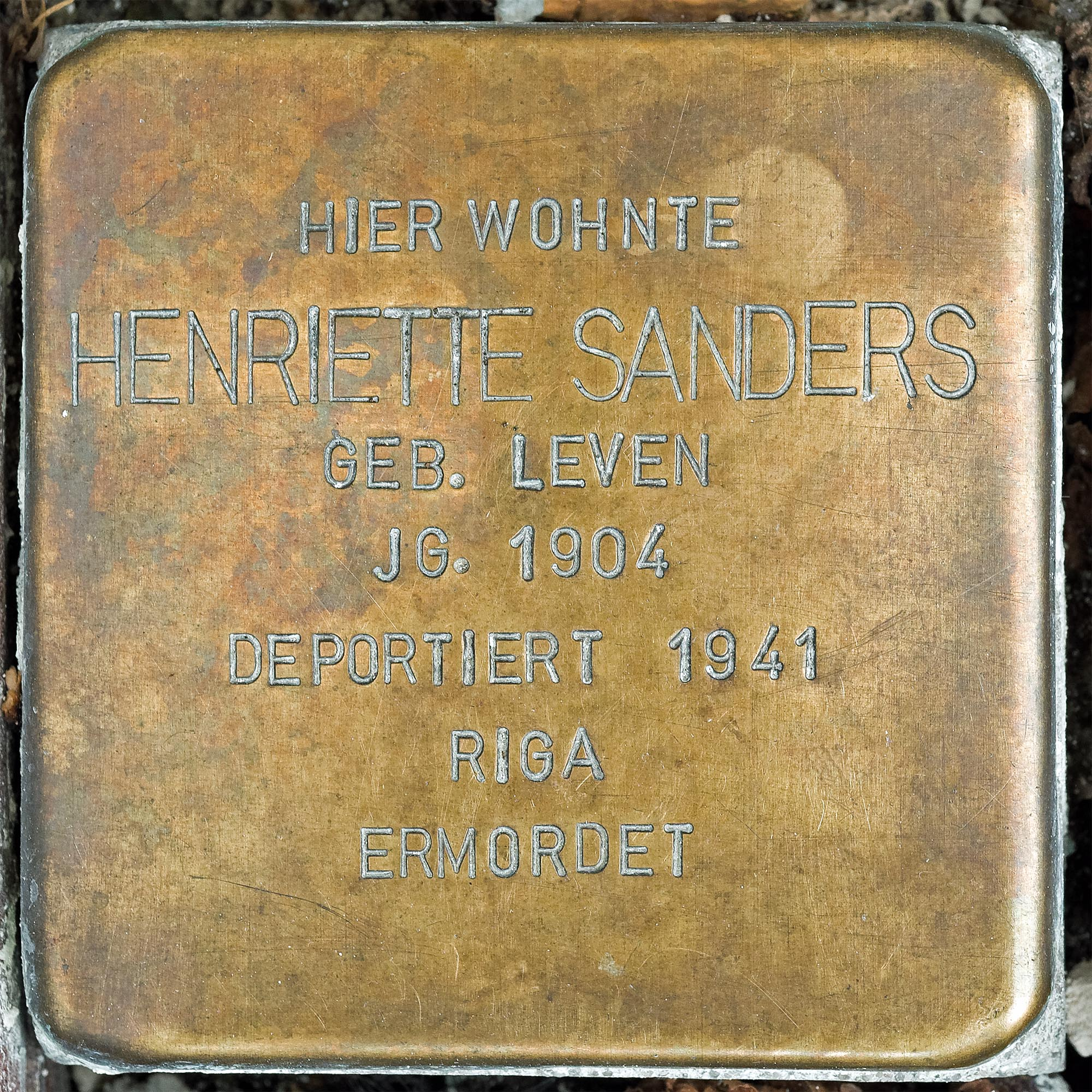 Stolperstein Sanders, Henriette